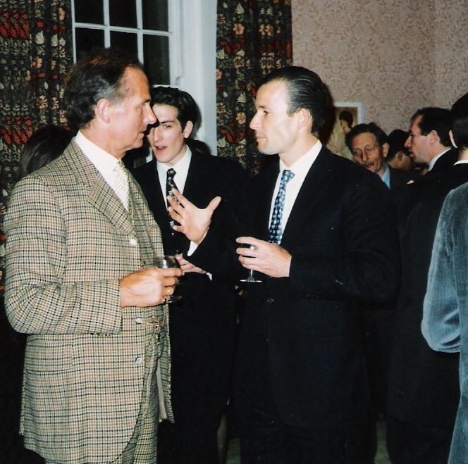 Count Nikolai Tolstoy, left, and Prince Kyrill of Bulgaria, Prince of Preslav, Duke of Saxony, right, at a reception at Exeter College, Oxford